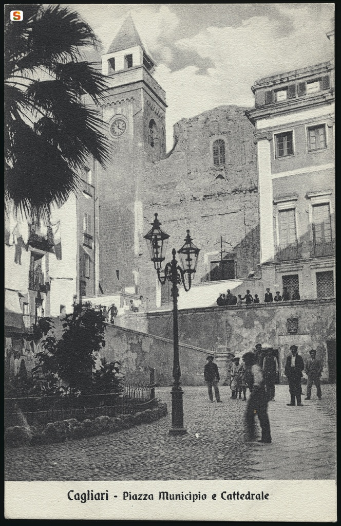 La cattedrale spogliata dei decori barocchi.